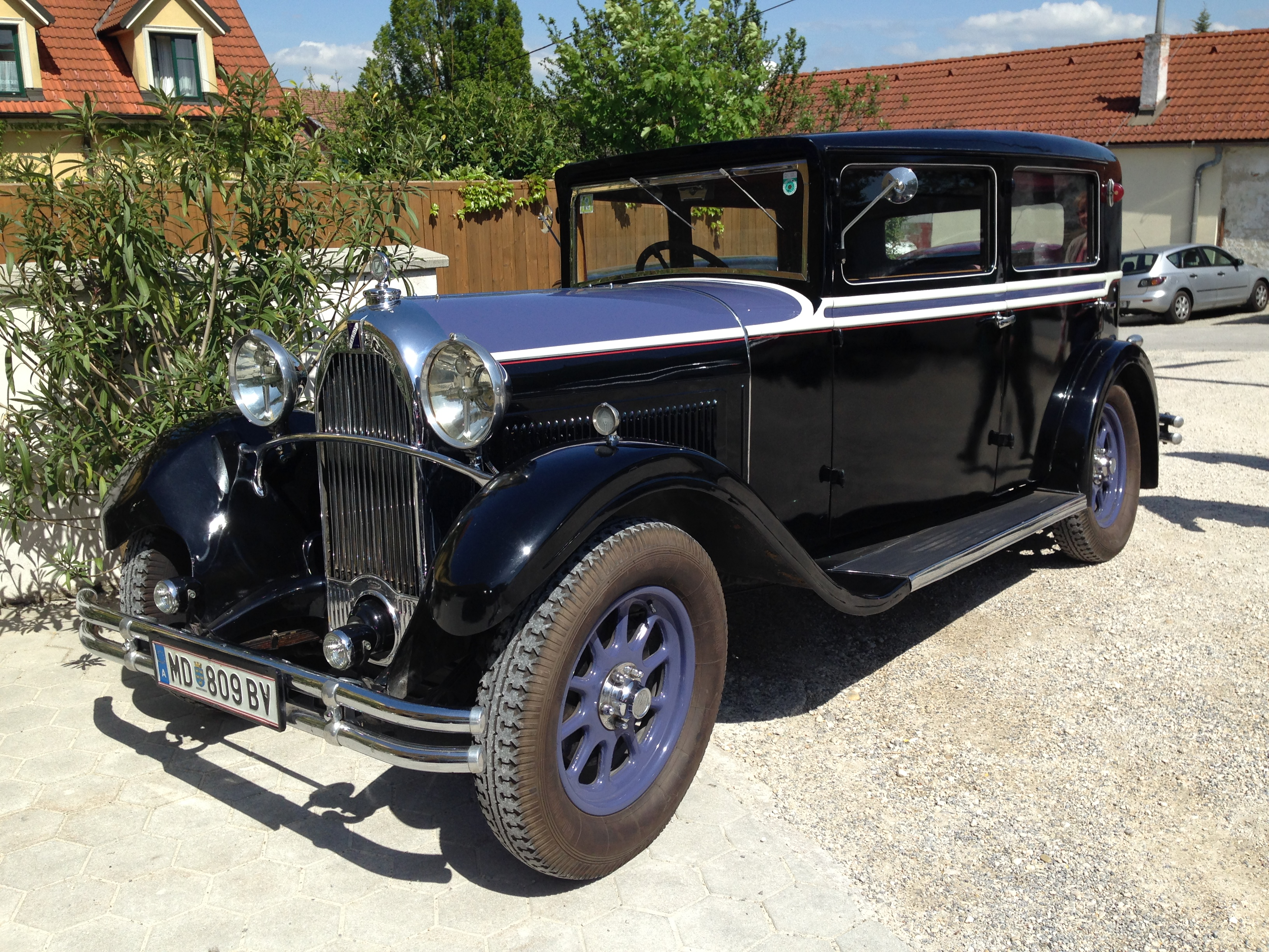 Talbot 11 CV M67 berline Hagenbrunn, Lower Austria